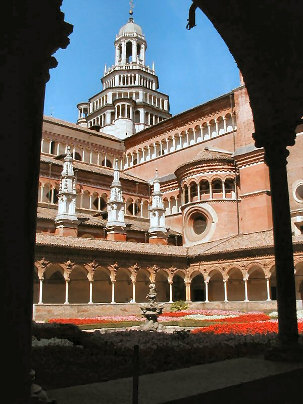 La Certosa di Pavia vista dal Chiostro (Foto Luigino C.) Agosto 2004